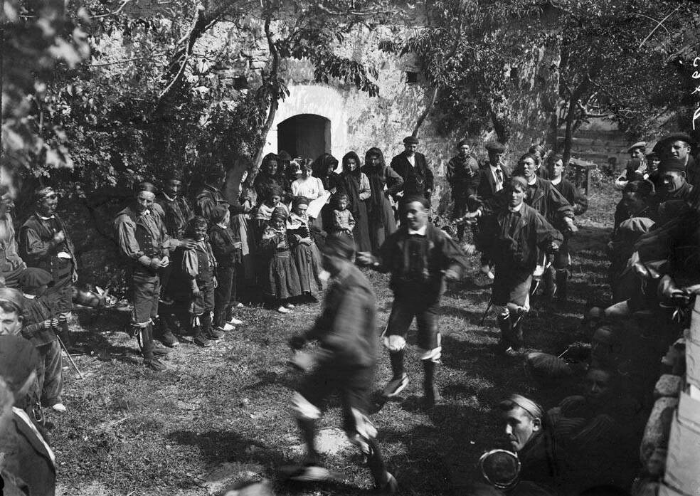 Imatge